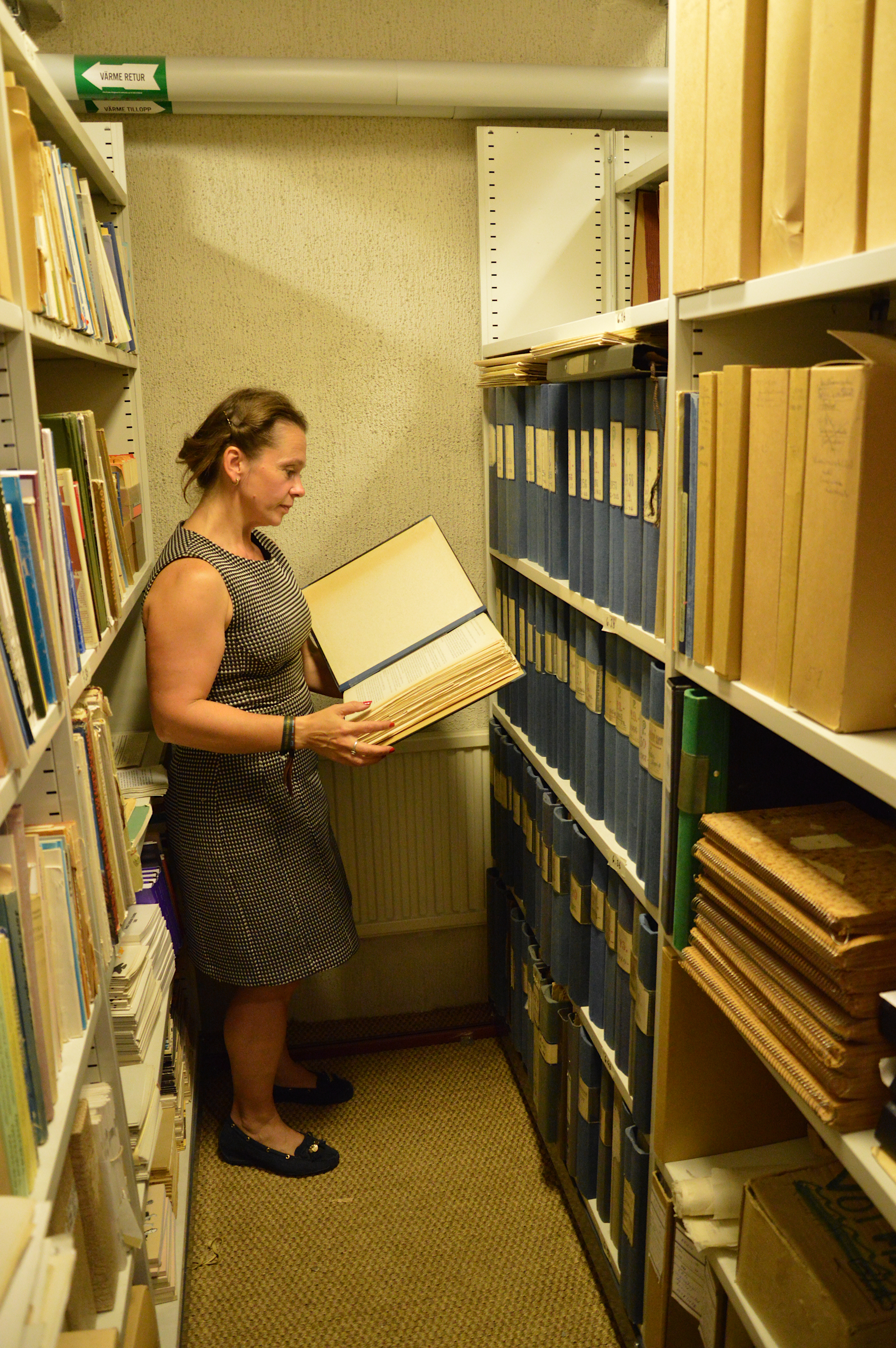 Sirle Sööt Rootsi Eestlaste Arhiivis